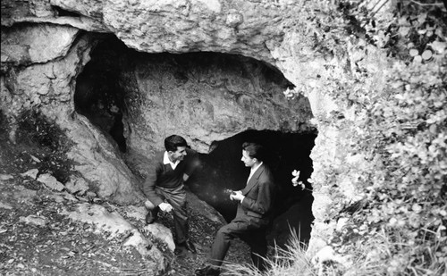 Garratxa I kobazuloa (Lumentxa mendian, Lekeitio), 1957 urteko irudia